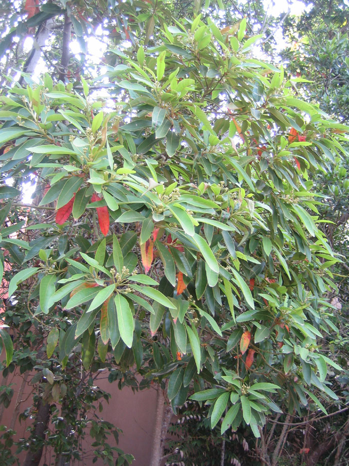 Persea indica. Viñatigo en el Parque nacional de Garajonay, La Gomera.